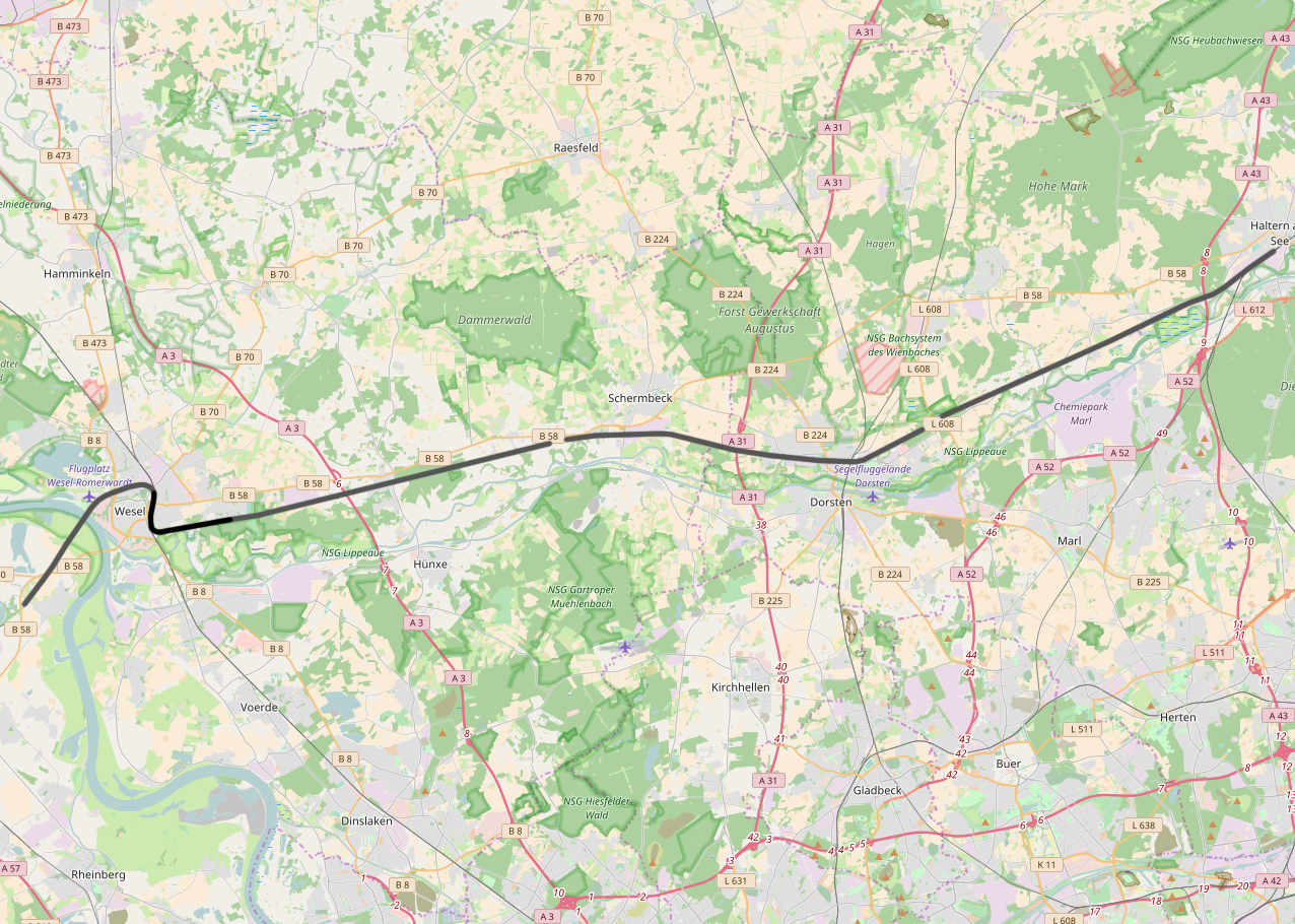 DB 2002, Haltern - Büderich